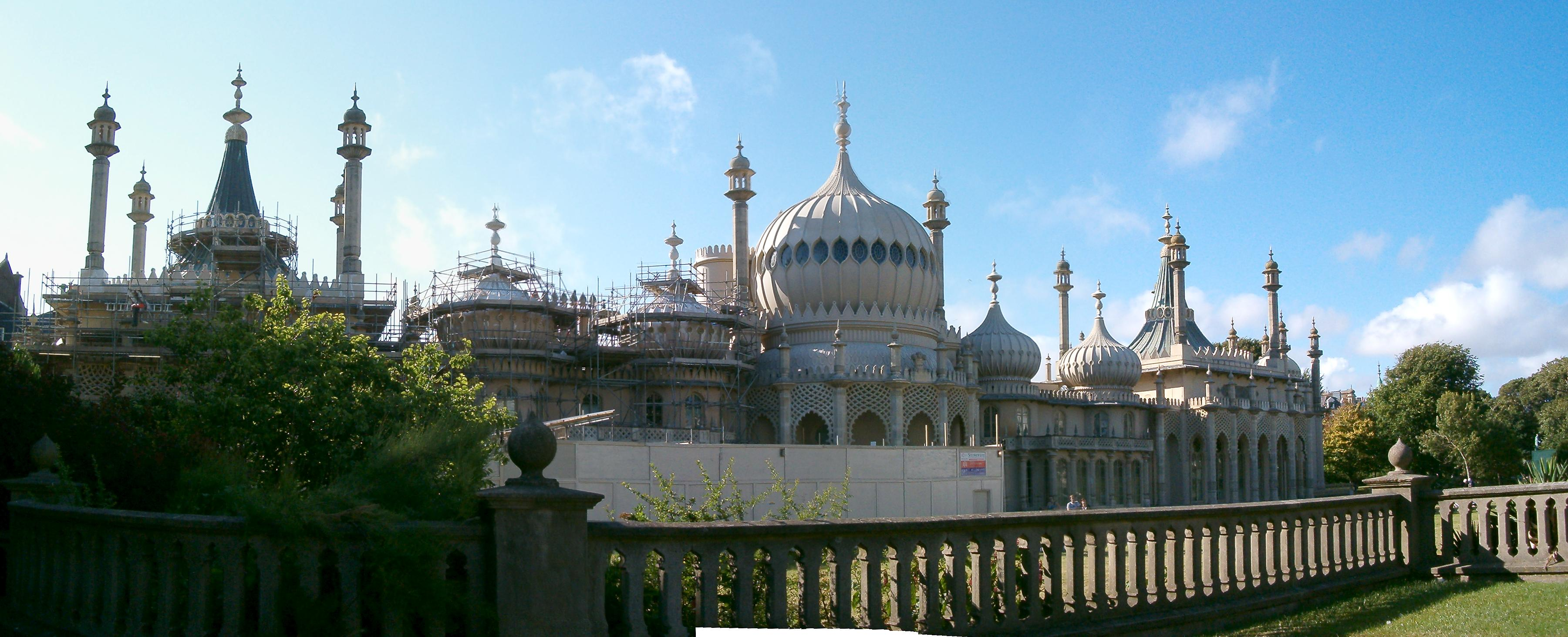 Panorama Royal Pavilion